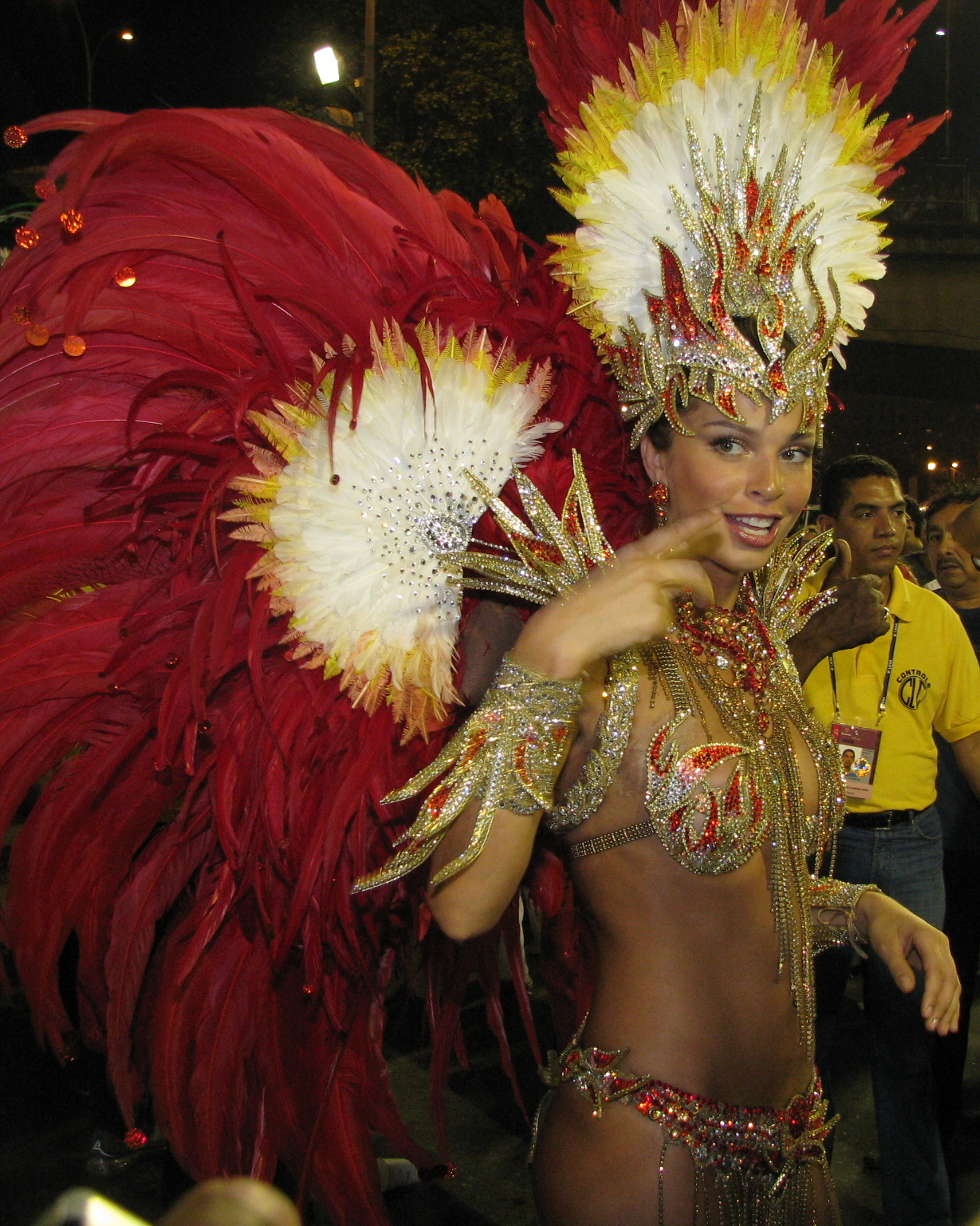 Grazieli Massafera como Rainha da Bateria da Grande Rio, no Carnaval do Rio de Janeiro 2008.